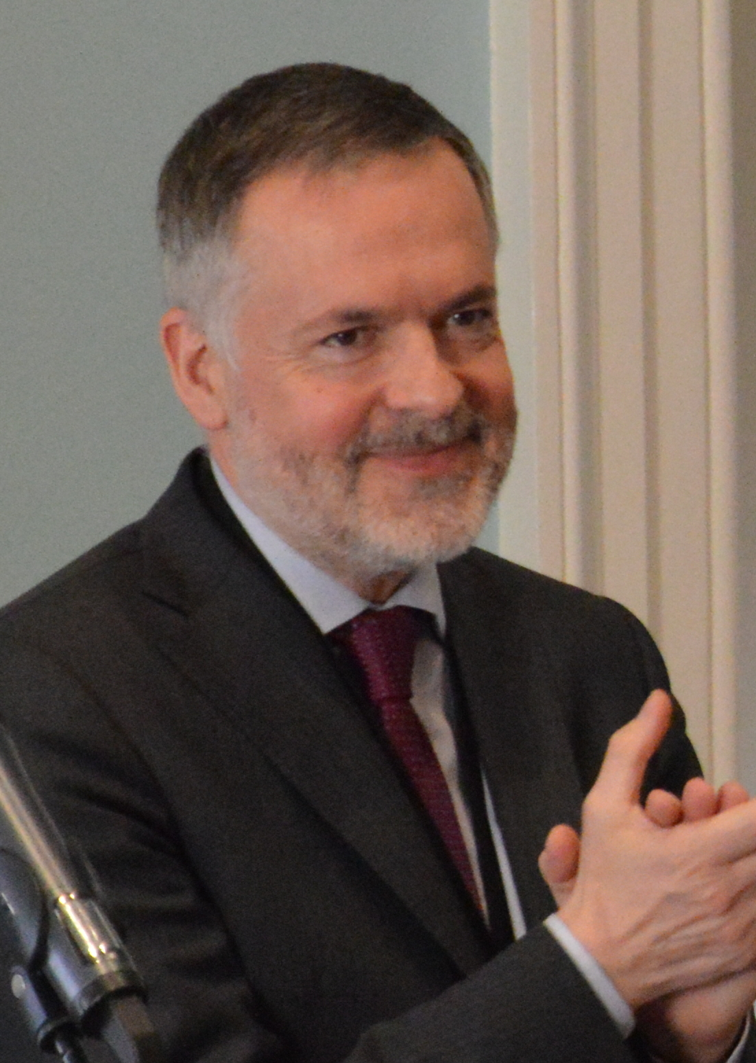 Hartwig Fischer and Matt Hancock MP